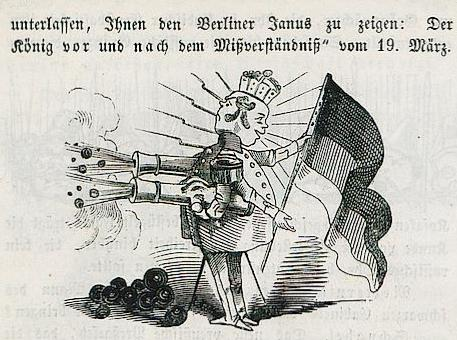 Münchner 'Leuchtkugeln', 1848.